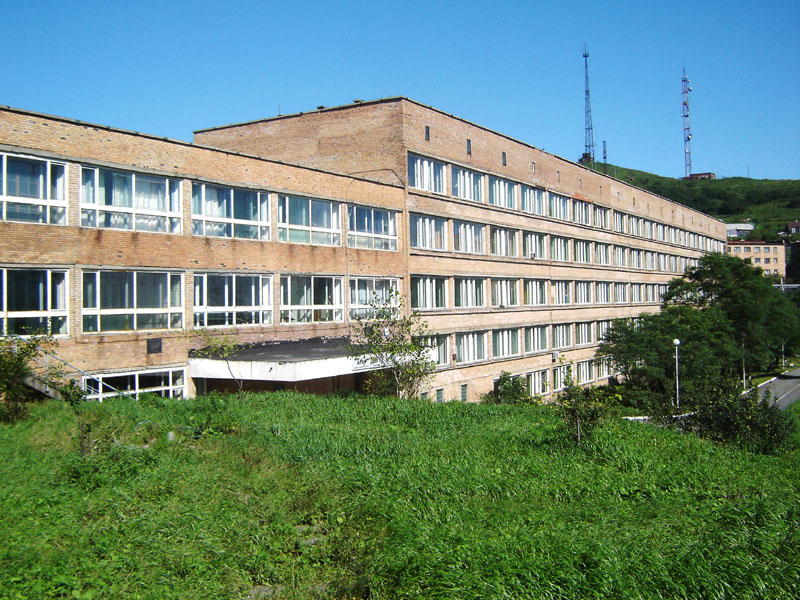 Корпус Б (ИРИЭТ) (Институт радиоэлектроники, информатики и электротехники) ДВГТУ, г. Владивосток, Аксаковский пер., 3